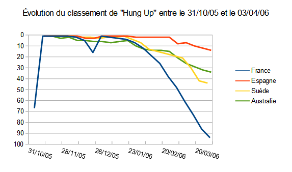 Évolution du classement du single Hung Up de Madonna entre le 31/10/05 et le 03/04/06.